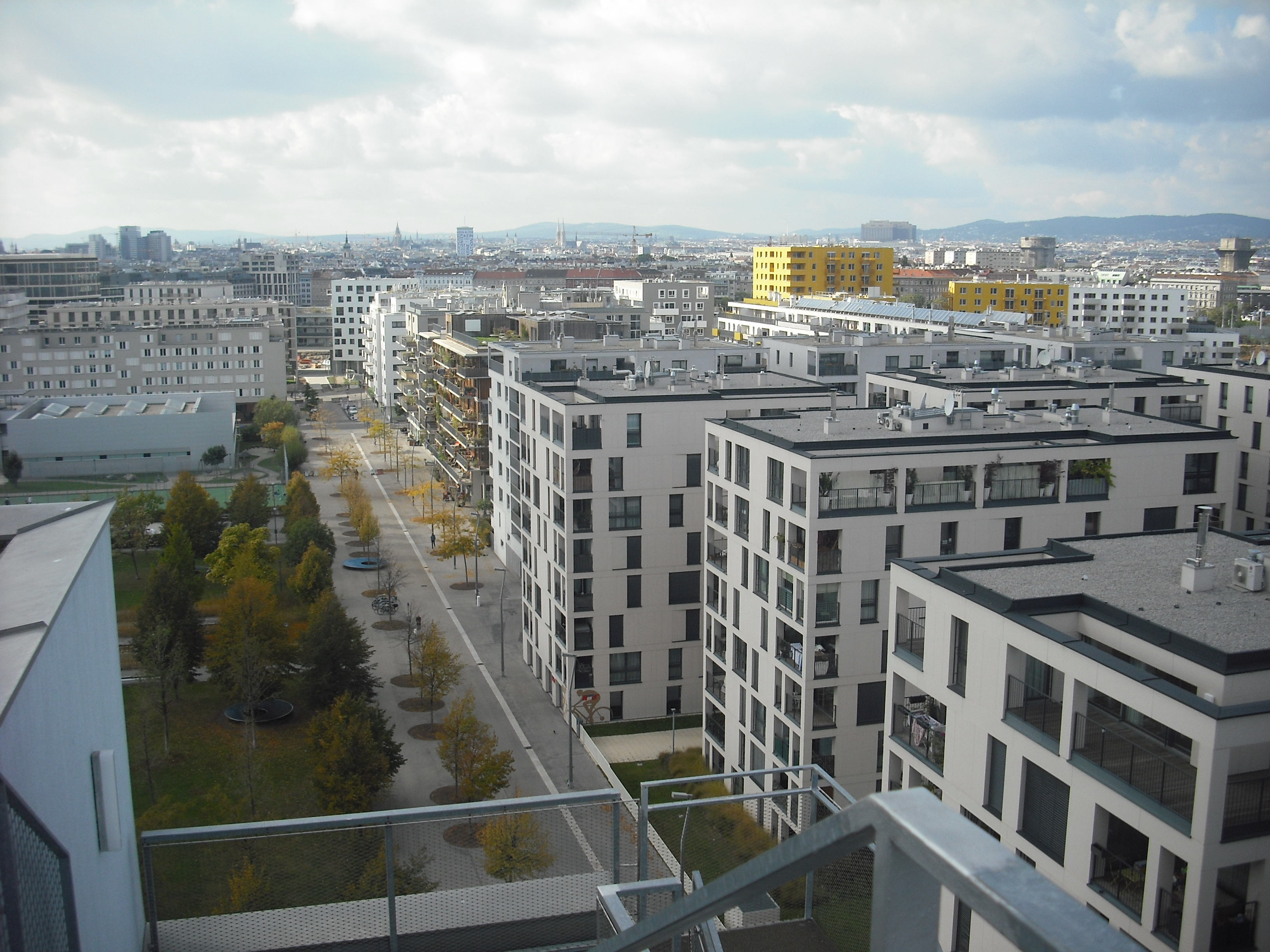 Blick vom Dach Vorgartenstraße 122 Richtung Bruno Marek Allee auf die Bauten in der Krakauer Straße, Schweidlgasse, Leystraße, Ernst Melchior-Gasse, links Rudolf Bednar Park 'Nordbahnviertel' (Q1997648)